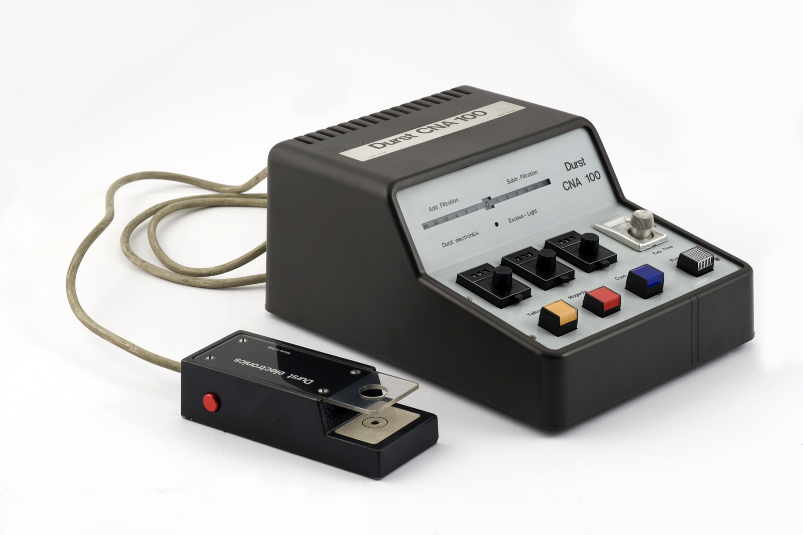 Dispositivo elettronico di forma trapezoidale. Sulla parete superiore sono inseriti i comandi. Tre pulsanti di colore giallo, magenta, ciano con relativi contatori. Accanto si hanno un timer per programmare il tempo di esposizione e un pulsante di accensione Sopra si ha una scala graduata centrata in 0 con valori1-2-5-10-20-50 sia a sinistra che a destra che indicano quando occorre aumentare il colore (Add. Filtration) e quando diminuirlo (Subtr. Filtration). Una spia indica quando si ha un eccesso di luce (Excess Light) Sul retro si ha un interrutore di accensione per la luce del pannello (Panel light), un trimmer per variare la tensione, una presa per il collegamento del cavo elettrico di alimentazione All'analizzatore è collegata la sonda esterna. Funzione Strumento professionale utilizzato in camera oscura per misurare e determinare i valori di filtratura e densità di negativi a colori da stampare con ingranditori fotografici con testa a colori.